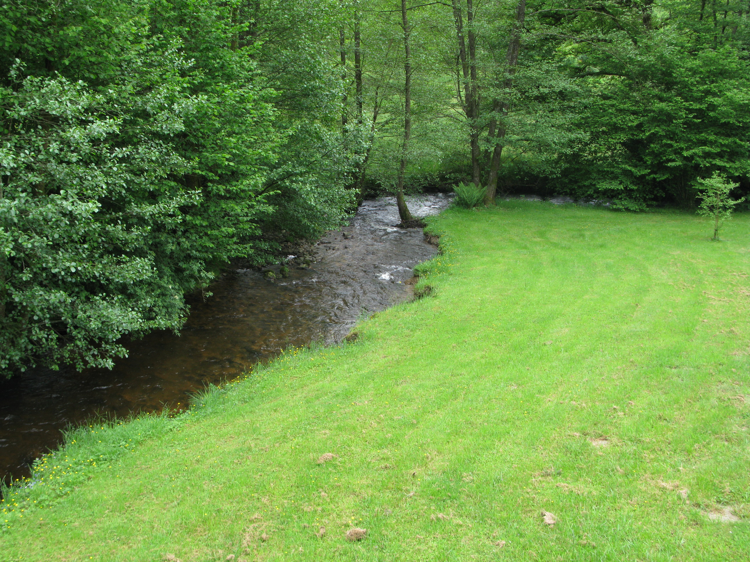 La Combade sur la commune de Domps (87)